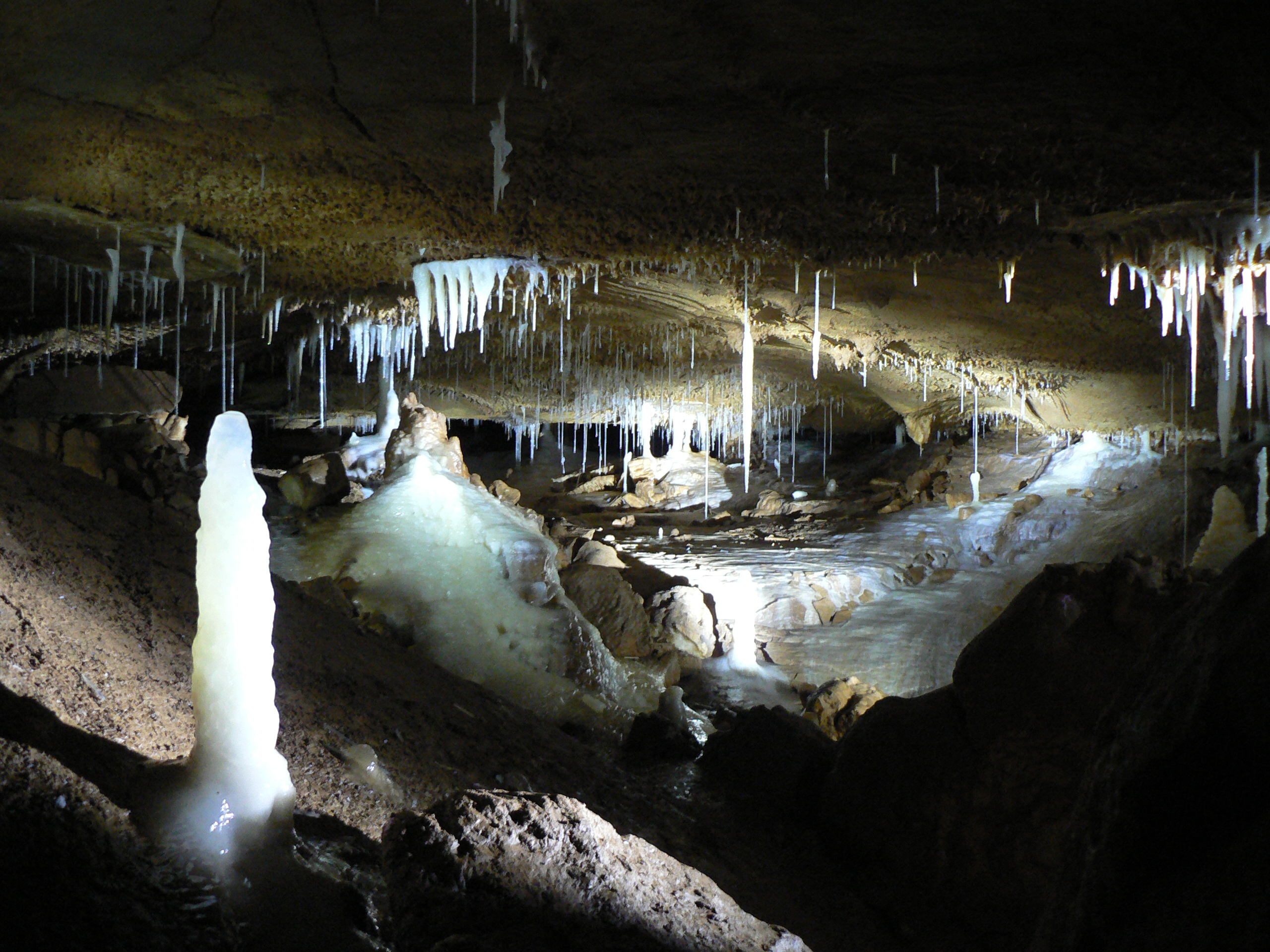 Herbstlabyrinth